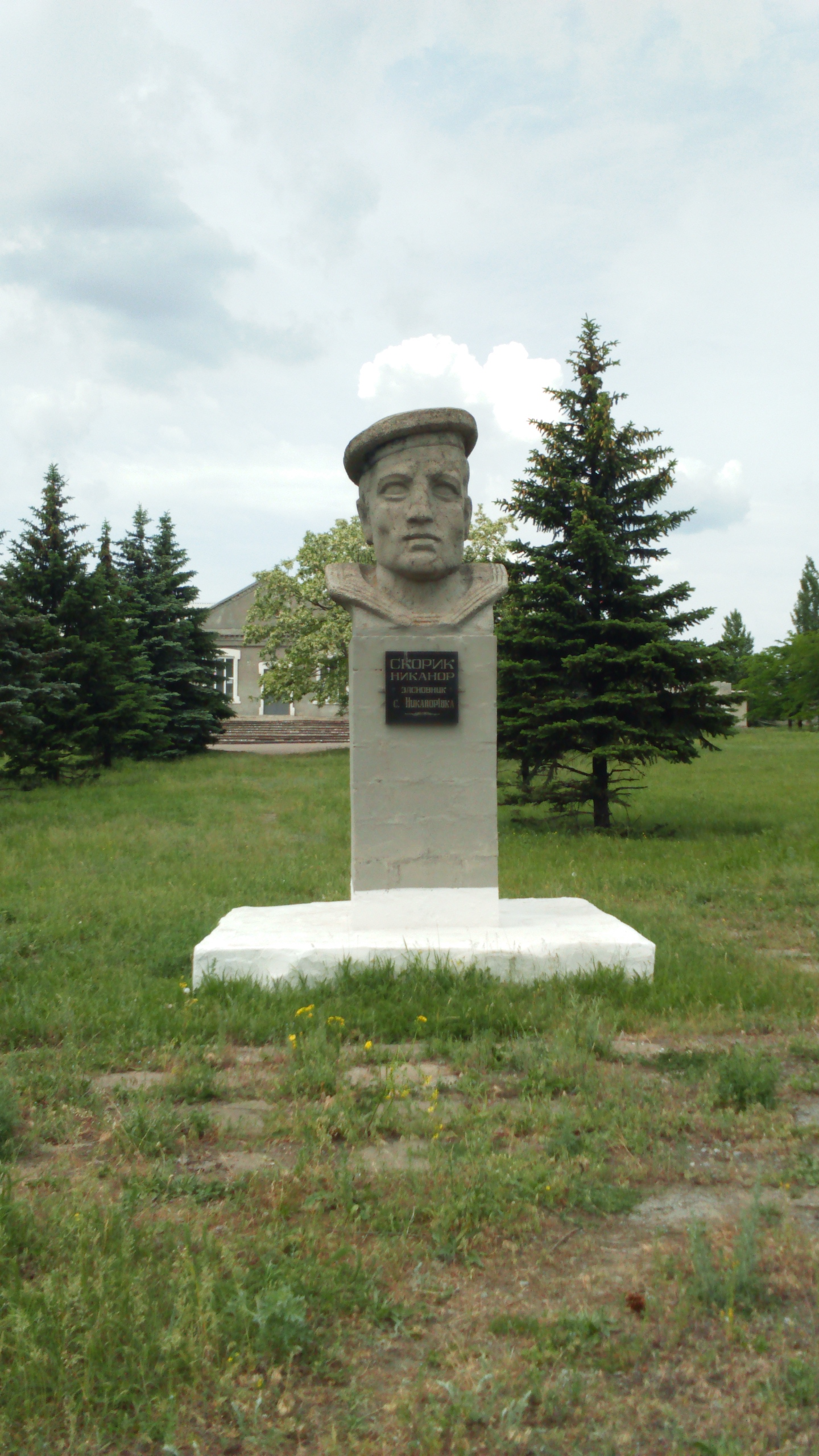 ело Никанорівка названа на честь матроса - революціонера Никанора Скорика.